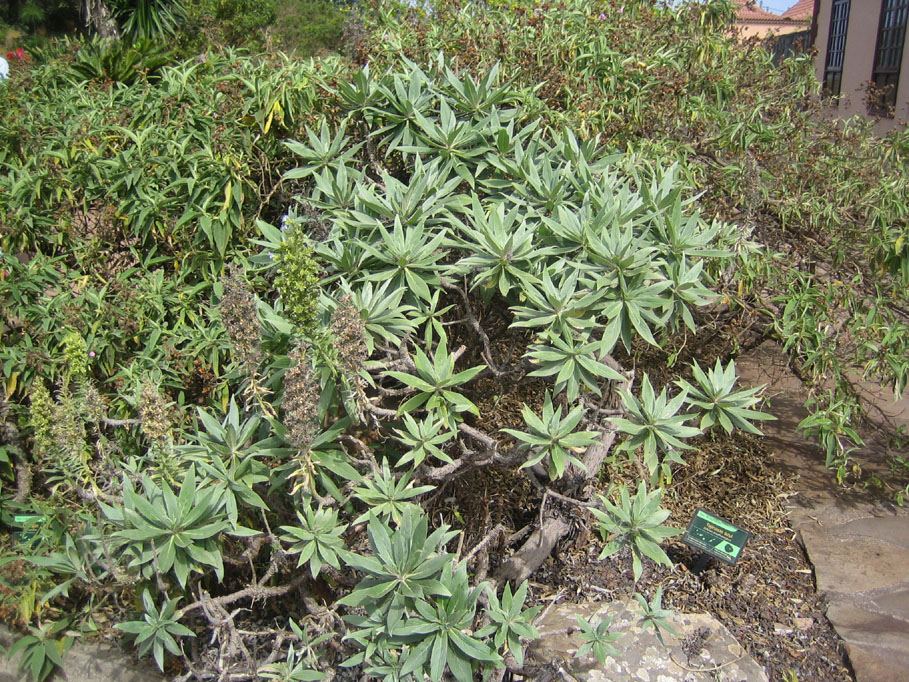 Echium acanthocarpum. Tajinaste azul de La Gomera